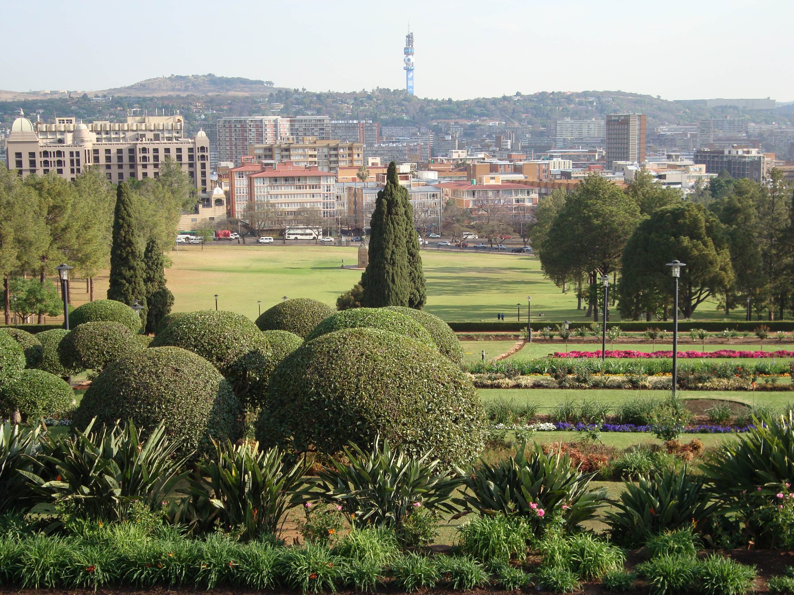 Pretoria, Africa de Sud